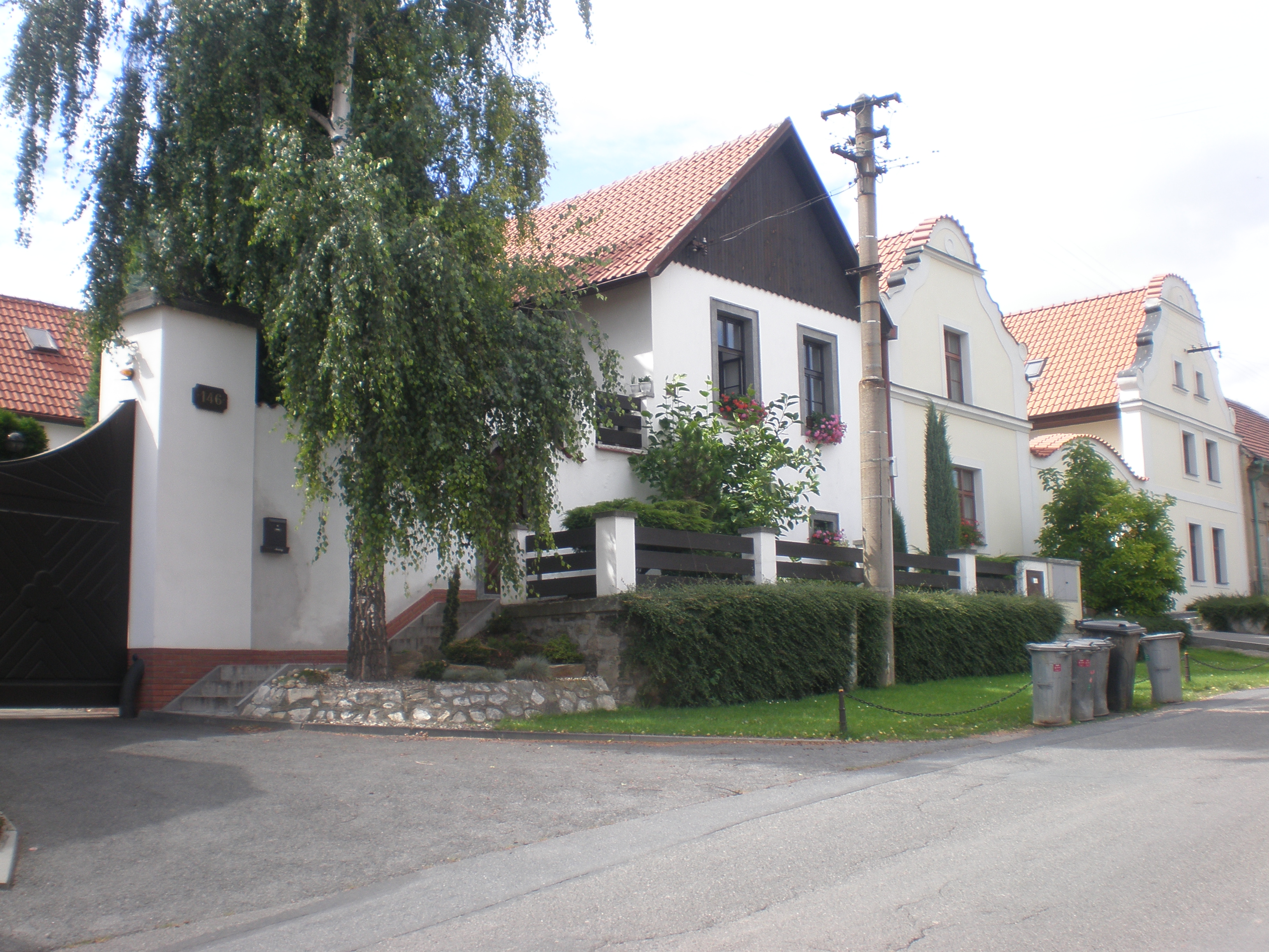 Bývalé usedlosti ledeckých sedláků (Ledce, okr. Kladno)